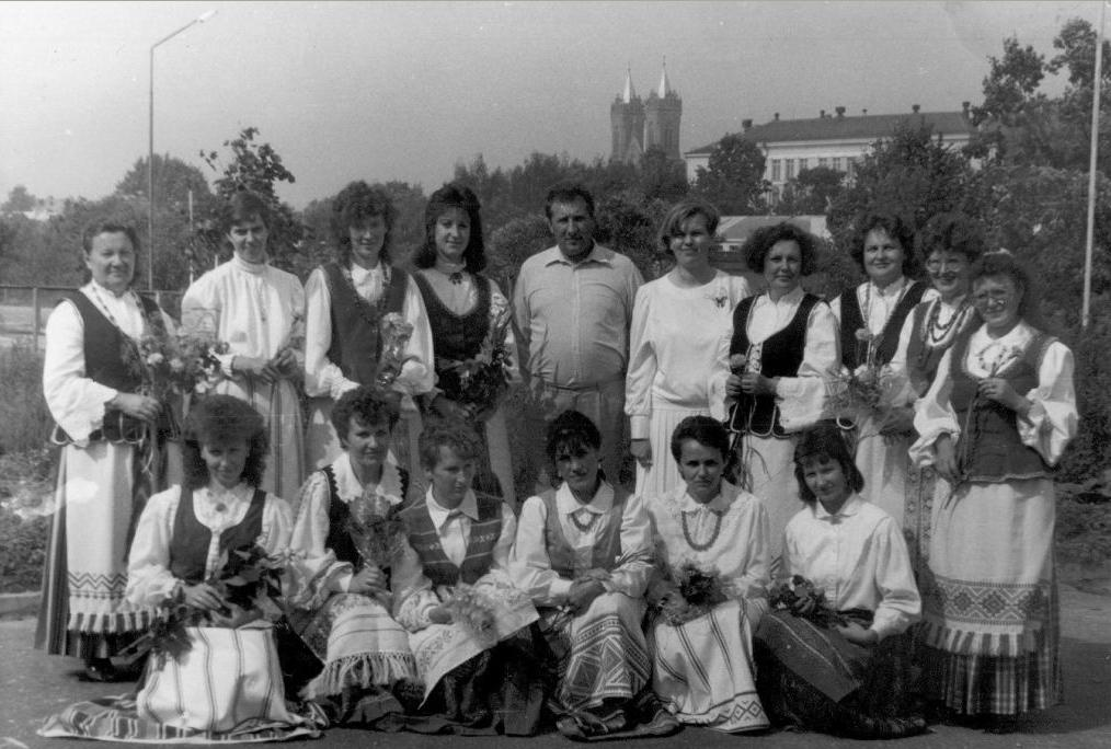 Kupiškio pradinės (vėliau - Kupos) mokyklos mokytojų kolektyvas 1992 metų rugsėjo 1 d.